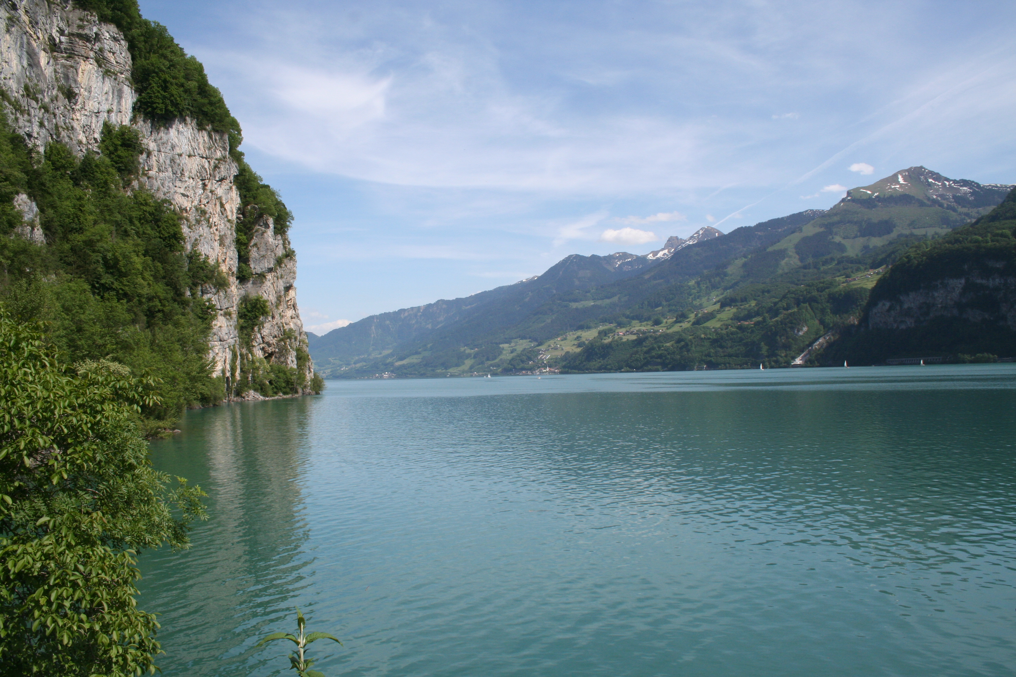 Walensee ostwärts, in der Bildmitte das Dorf Murg